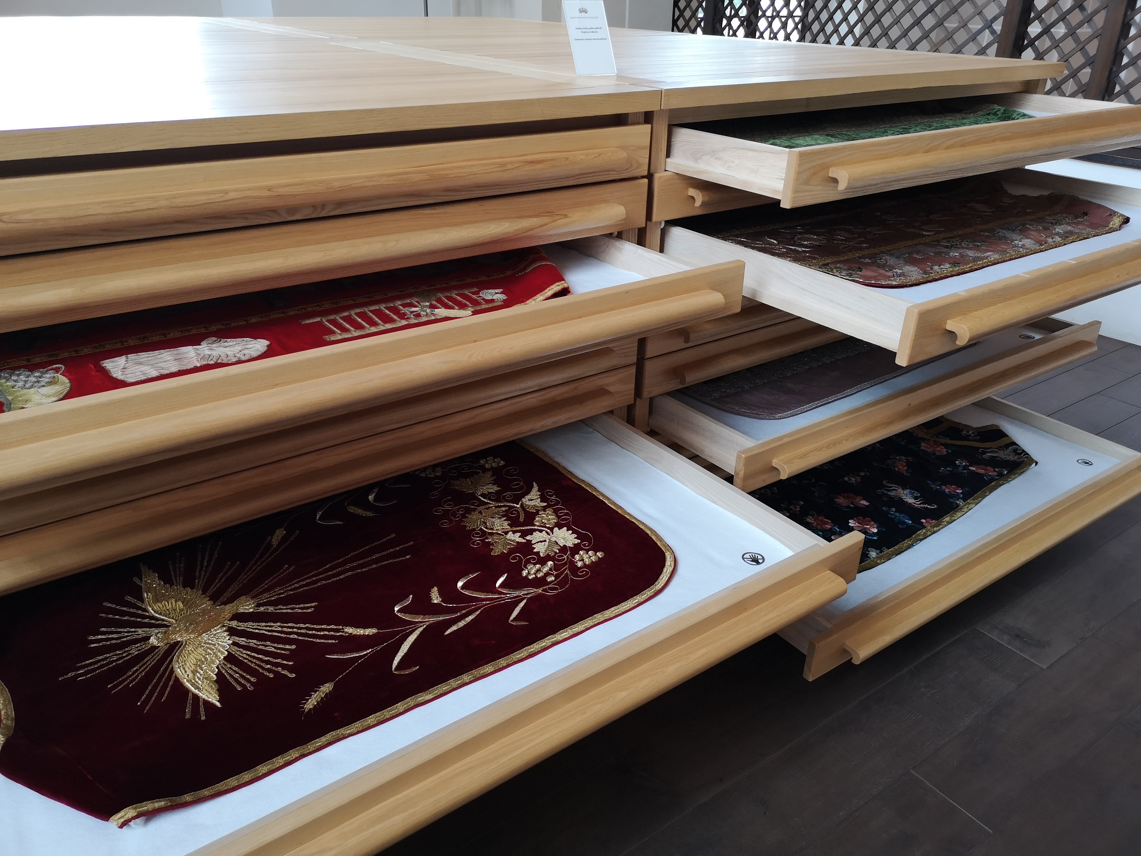 Liturginės aprangos pavyzdžiai.